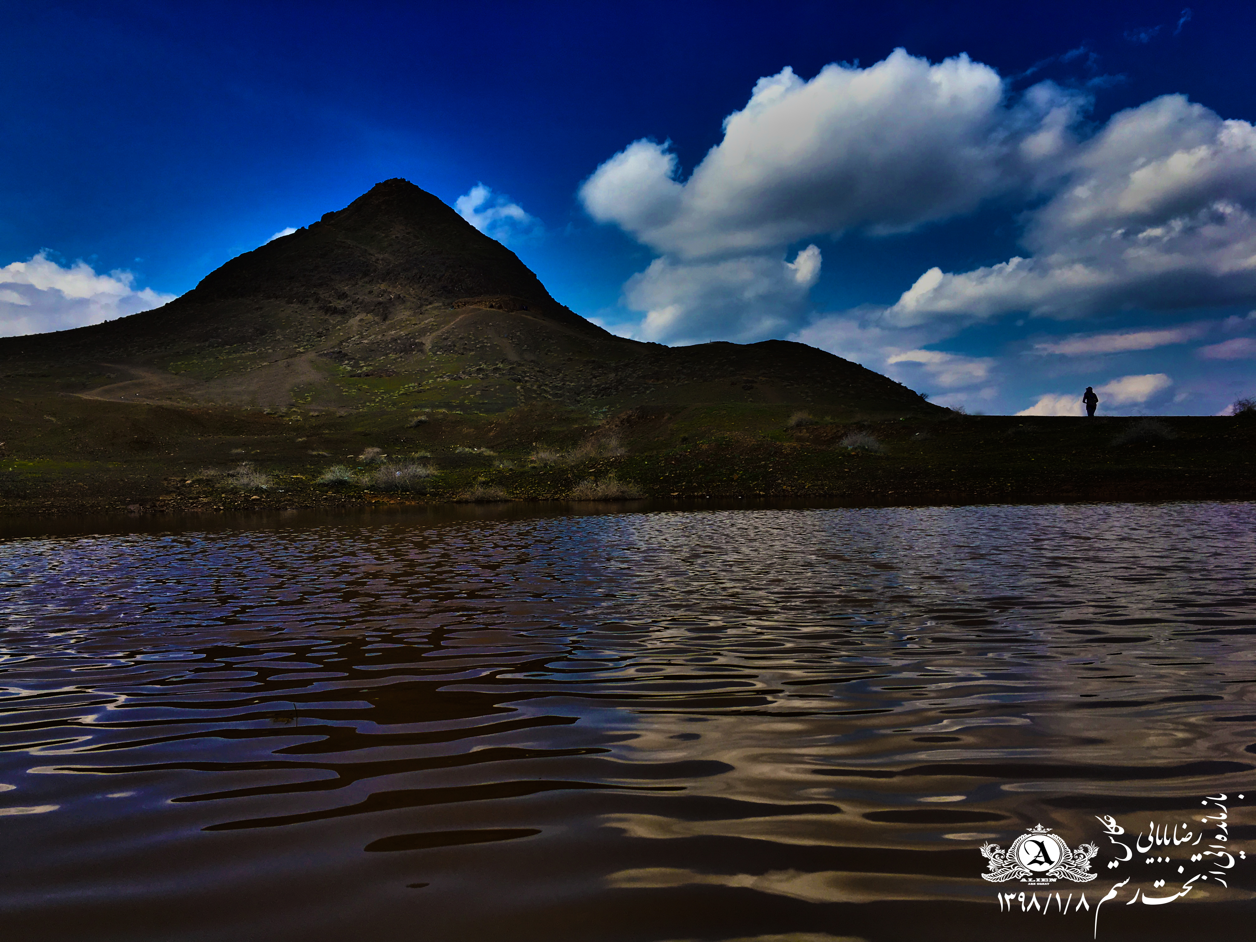 takht rostam